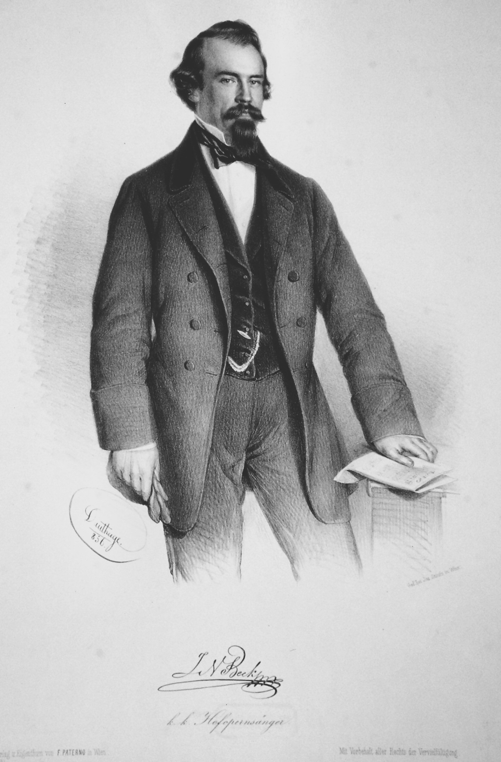 Johann Nepomuk Beck (1807-1904), ungarischer Opernsänger (Bariton). Lithographie von Adolf Dauthage, 1856